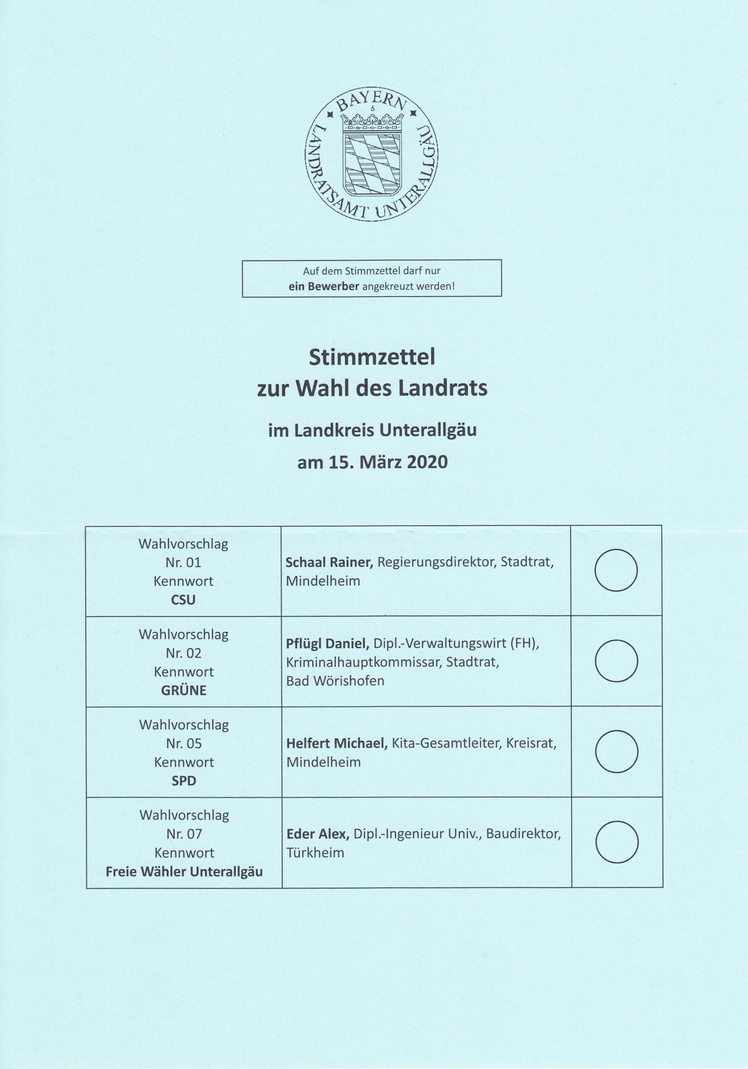 Stimmzettel zur Wahl des Landrats, Landkreis Unterallgäu, Bayern